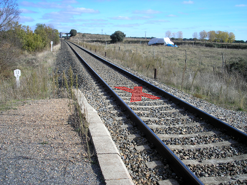 Posición del antiguo paso a nivel del p. k. 53,205 de la línea férrea Salamanca - Fuentes de Oñoro